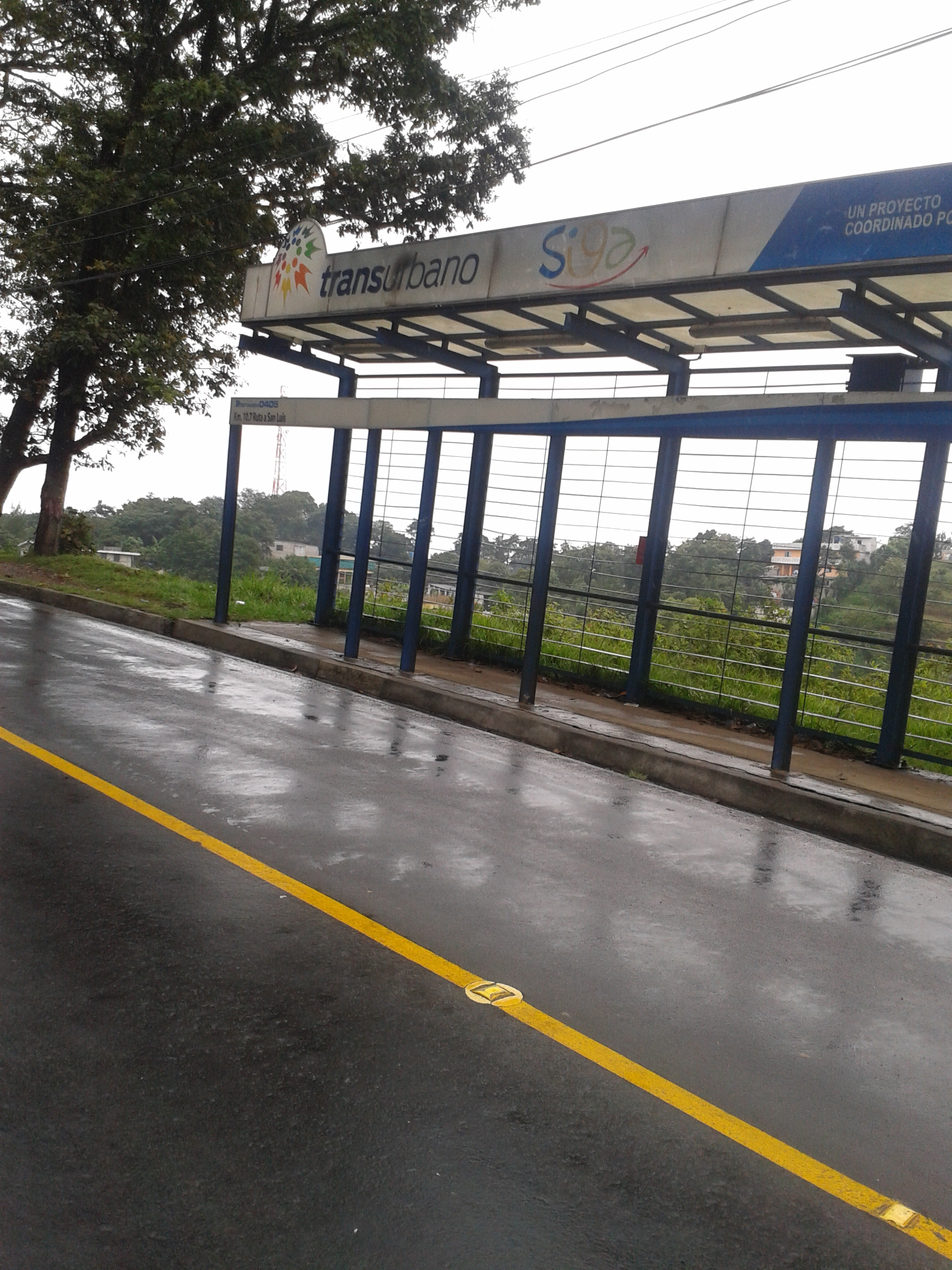 Estación del sistema de transportes transurbano de Guatemala, abandonada.